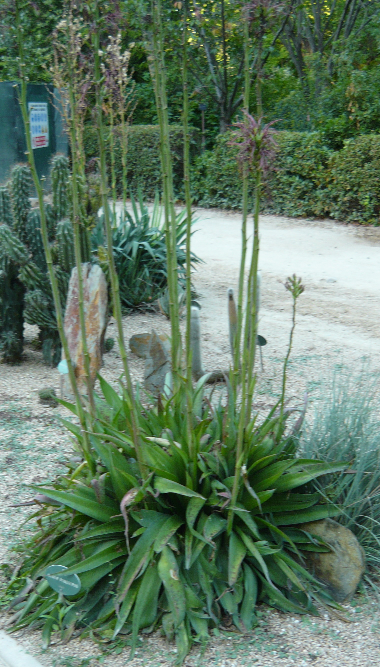 Agave pubescens. Real Jardín Botánico de Madrid.